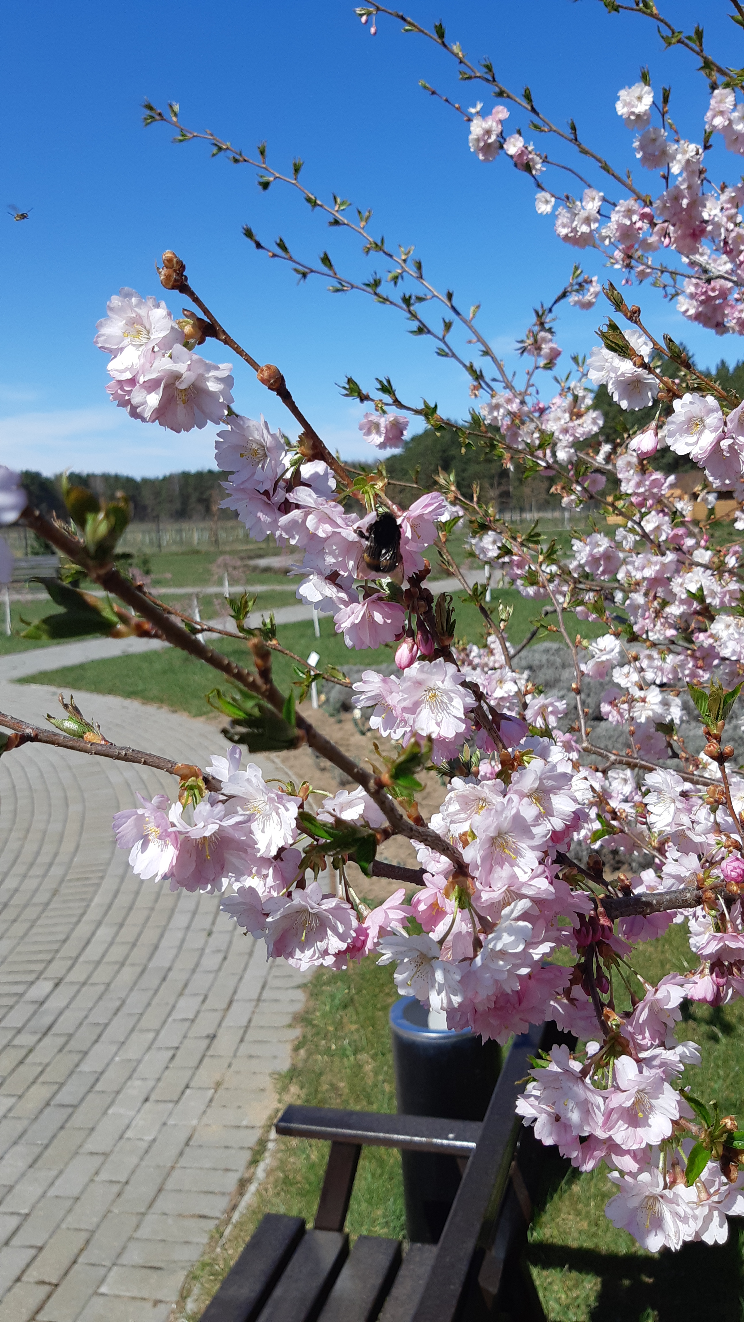 цветение сакуры в аптекарском саду